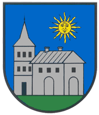 Герб Чинадійово 1843р.